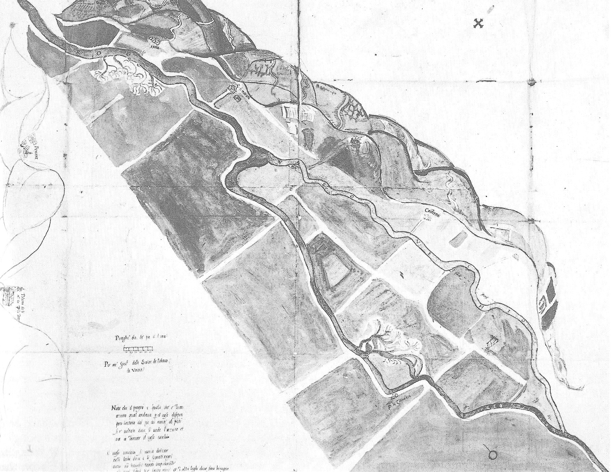 La valle di Fumane (provincia di Verona) raffigurata in una mappa della metà del XVI secolo. È la più antica mappa della zona, mostra in particolare la situazione idrografica dopo la rottura degli argini del Progno. Venne realizzata per conto del Magistrato dei Beni Inculti di Venezia.